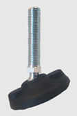 maskinsko